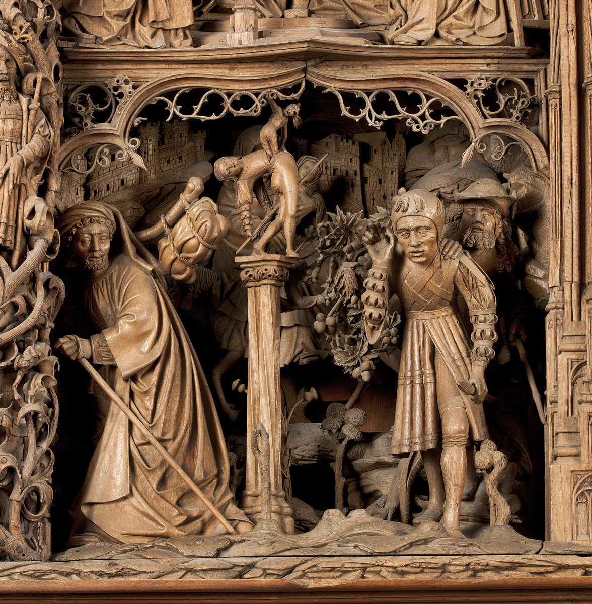 Sieben-Schmerzen-Altar, Flucht nach Ägypten